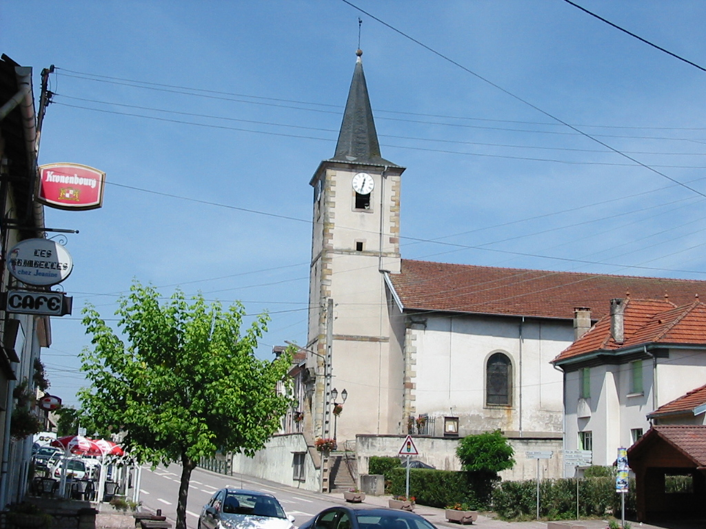 Église de Bertrichamps (Meurthe-et-Moselle)